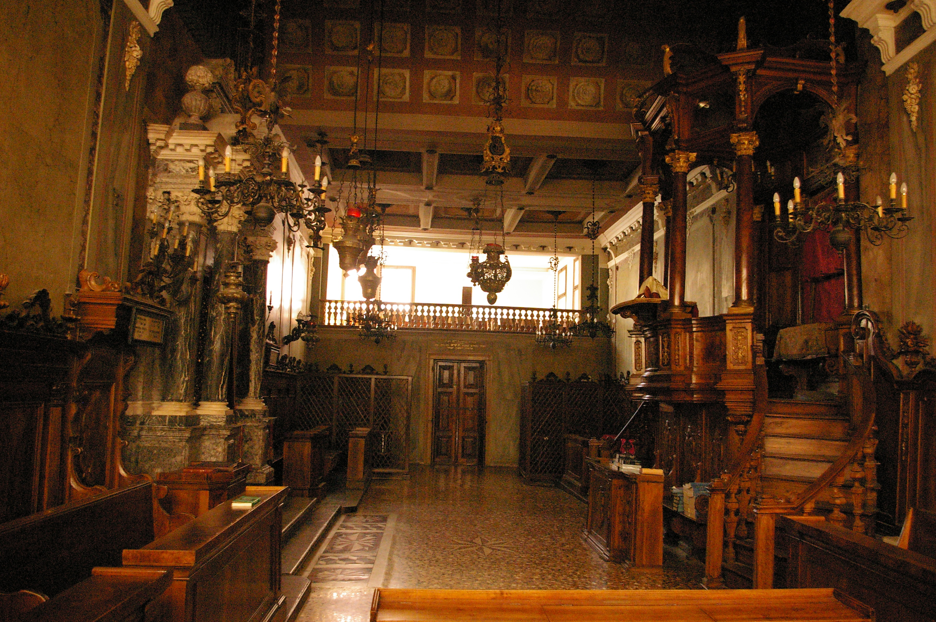 Vue générale de l'intérieure de la synagogue italienne de Padoue (1617)